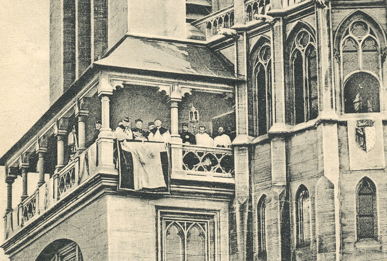 Weisung des "Kleides Mariens" während der Heiligtumsfahrt 1909 in Aachen vom Westwerk des Aachener Domes